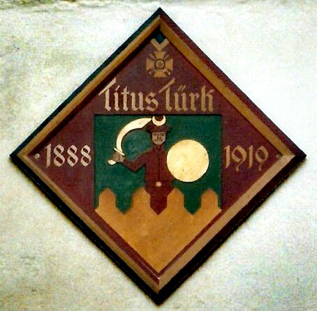 DasTürk'sche Wappen im Admiralsraum des Lübecker Ratskellers